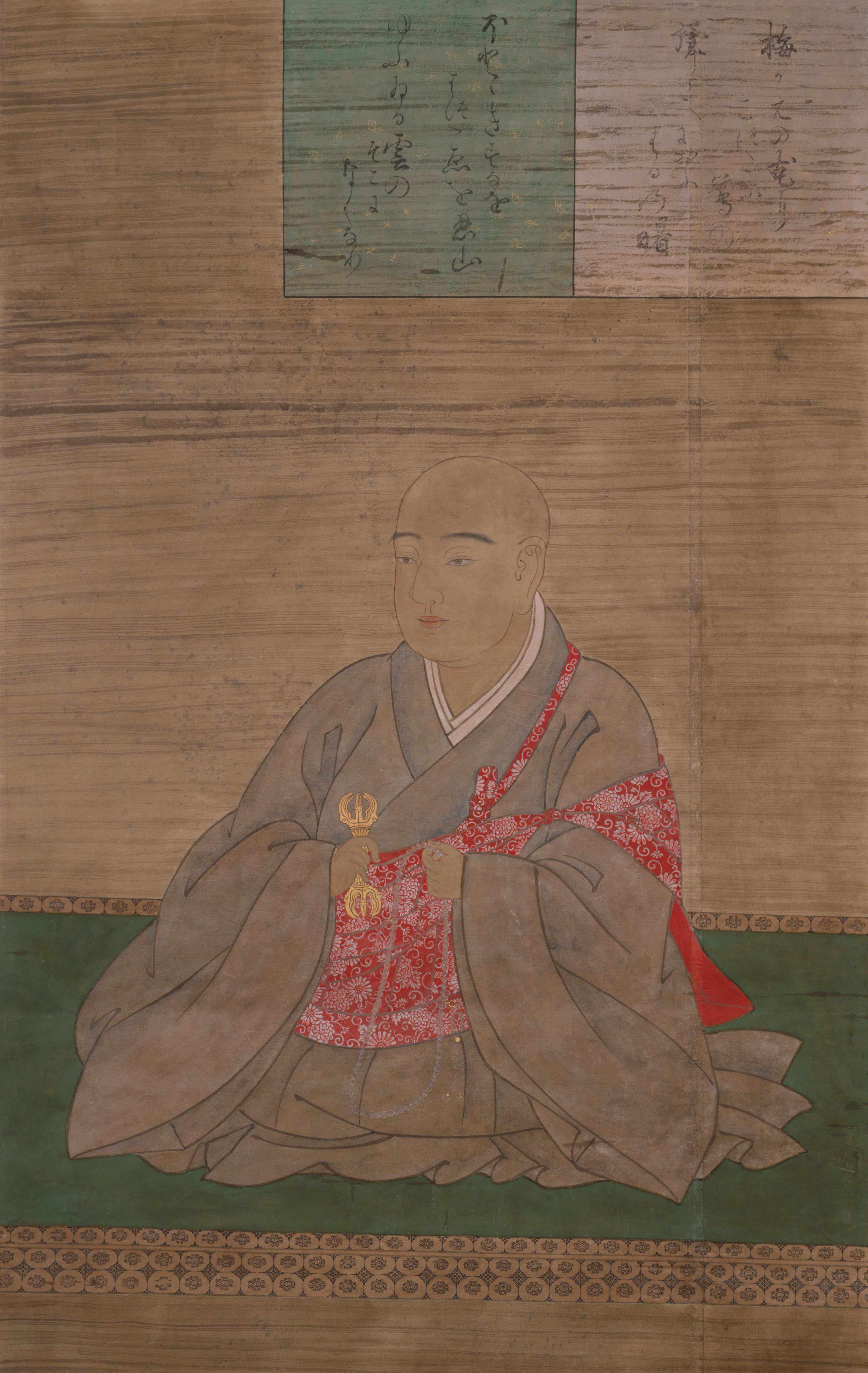 守覚法親王の肖像(複製)。